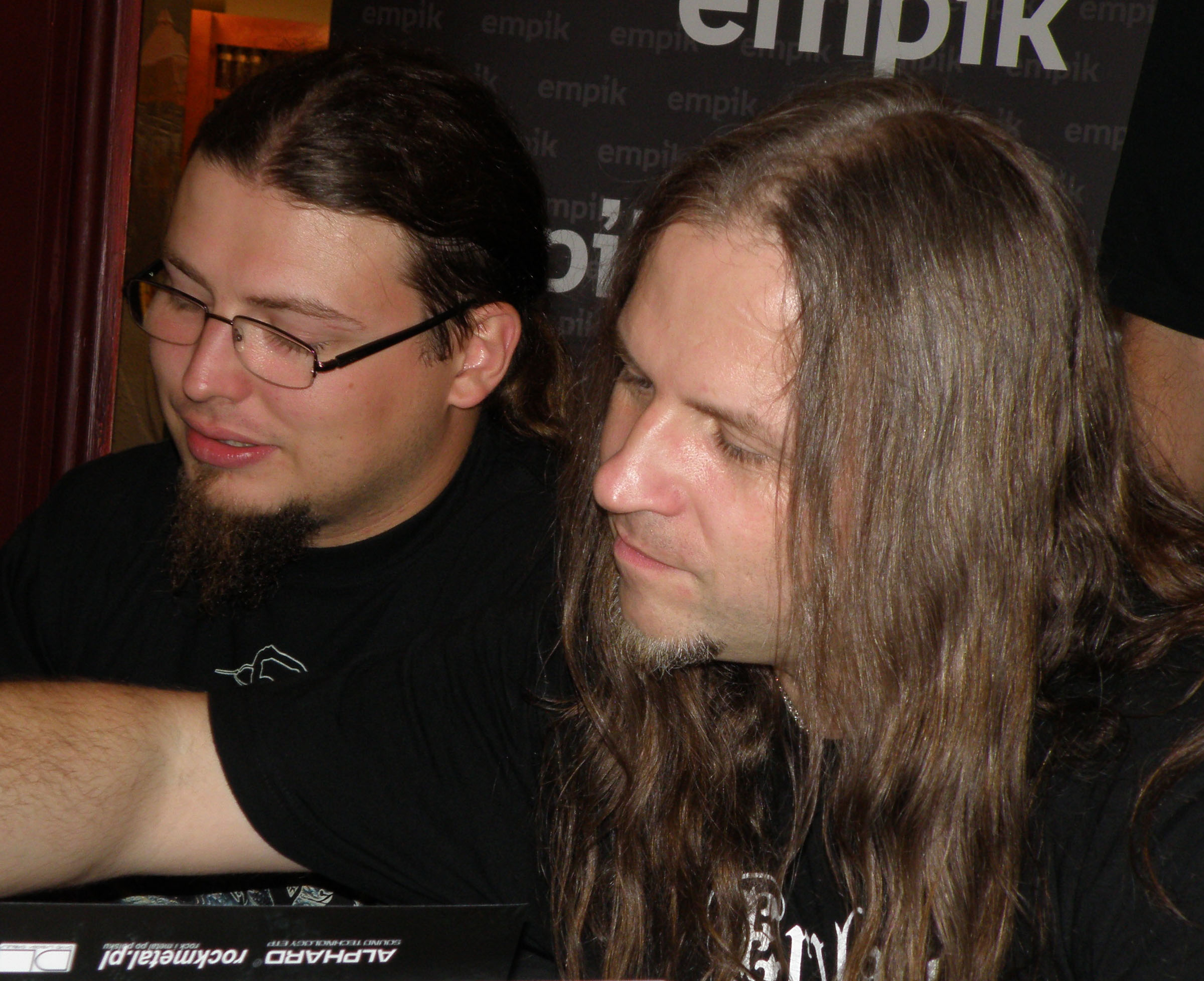 Vader, Warszawa, EMPiK Megastore Nowy Świat, ul. Nowy Świat 15/17 (29 sierpnia 2009)